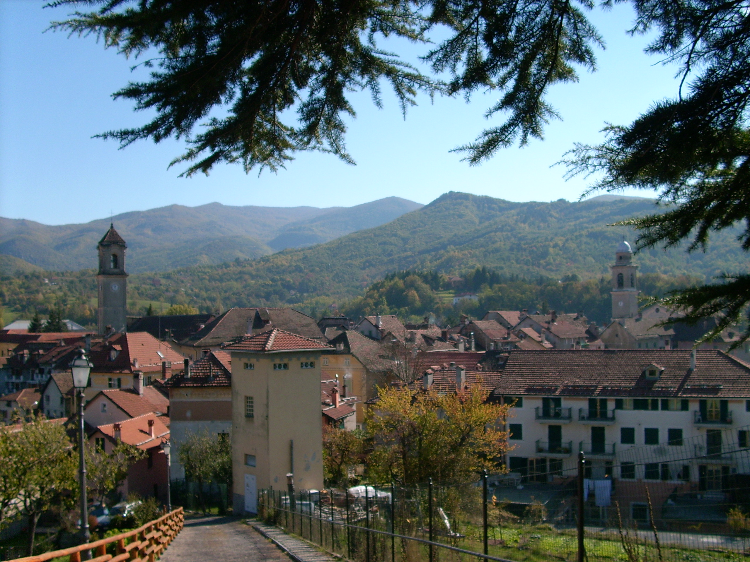 Sassello, Liguria, Italia